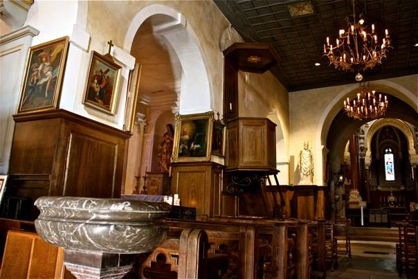 ancienne nef d'Ars